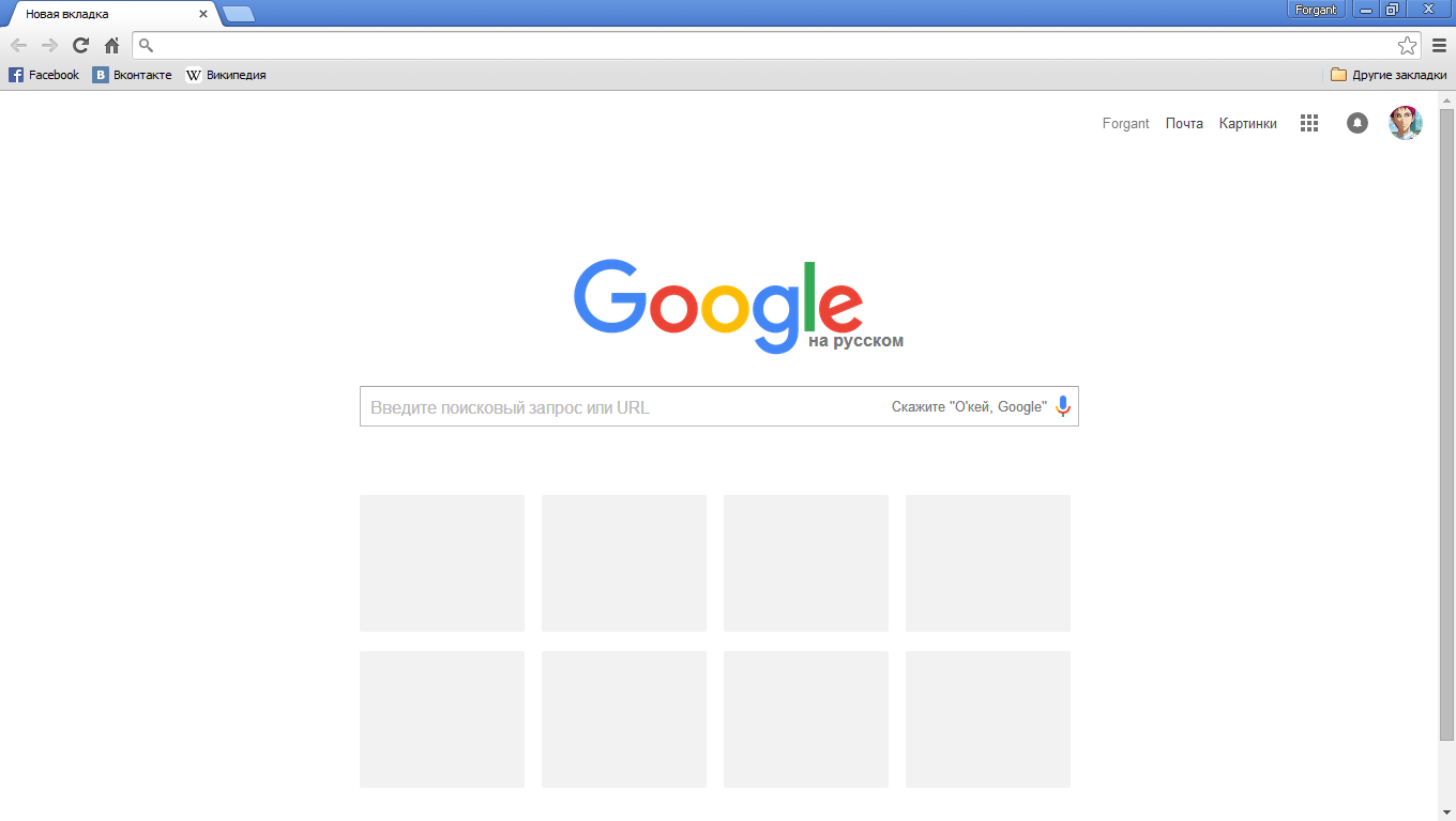 Google Chrome версии 45.0.2454.85 на Windows XP.